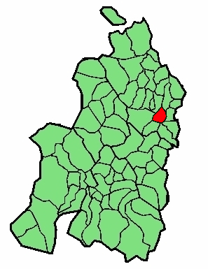 Donapaleu udalerriaren kokapena Nafarroa Beherean